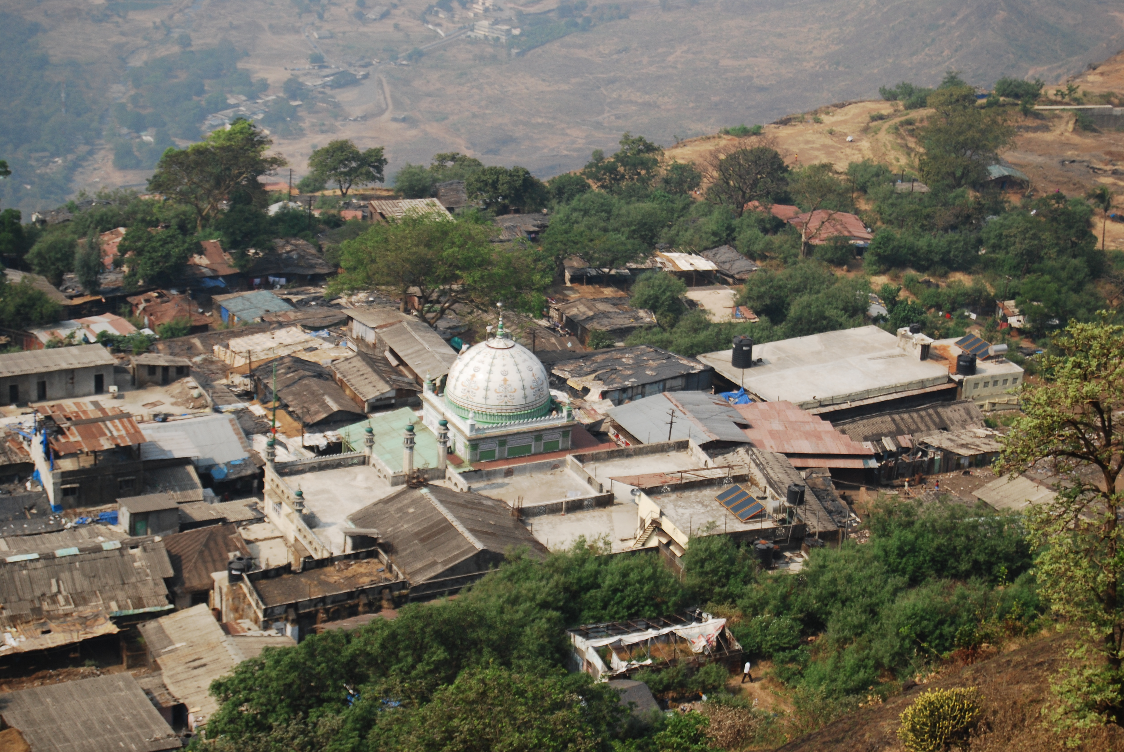 Hai Malang Durgah, Maharashtra